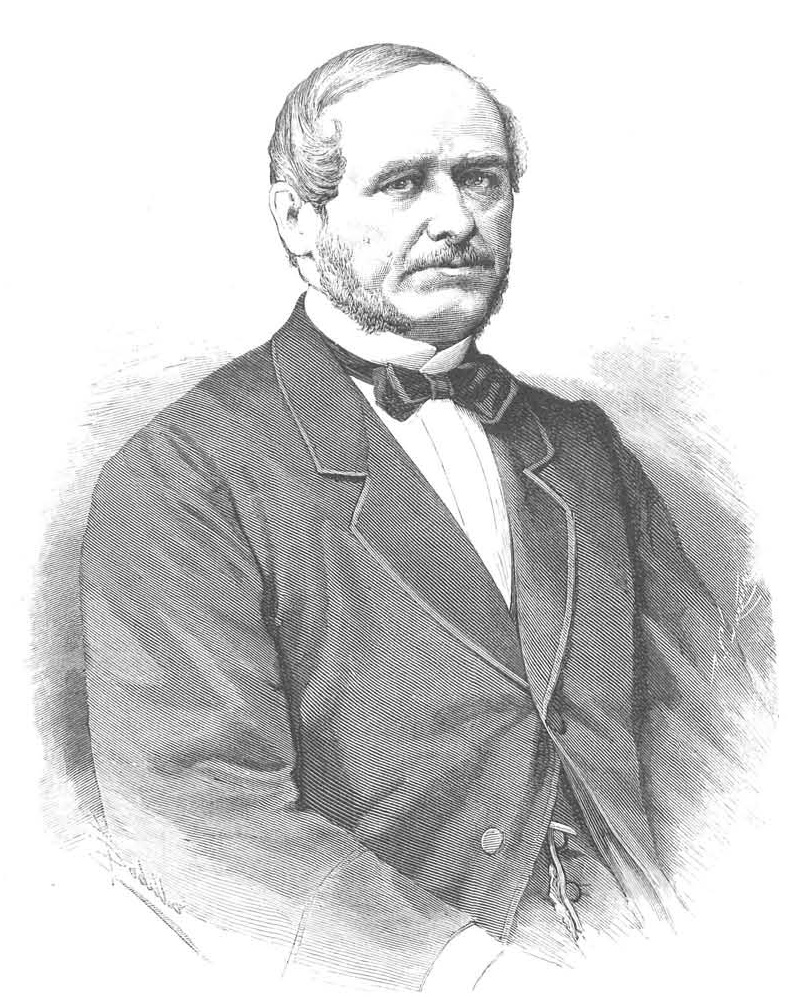 Francisco de las Rivas y Ubieta. Grabado de Arturo Carretero por dibujo de Félix Badillo, La Ilustración Española y Americana, 15 de mayo de 1882. Biblioteca Nacional de España